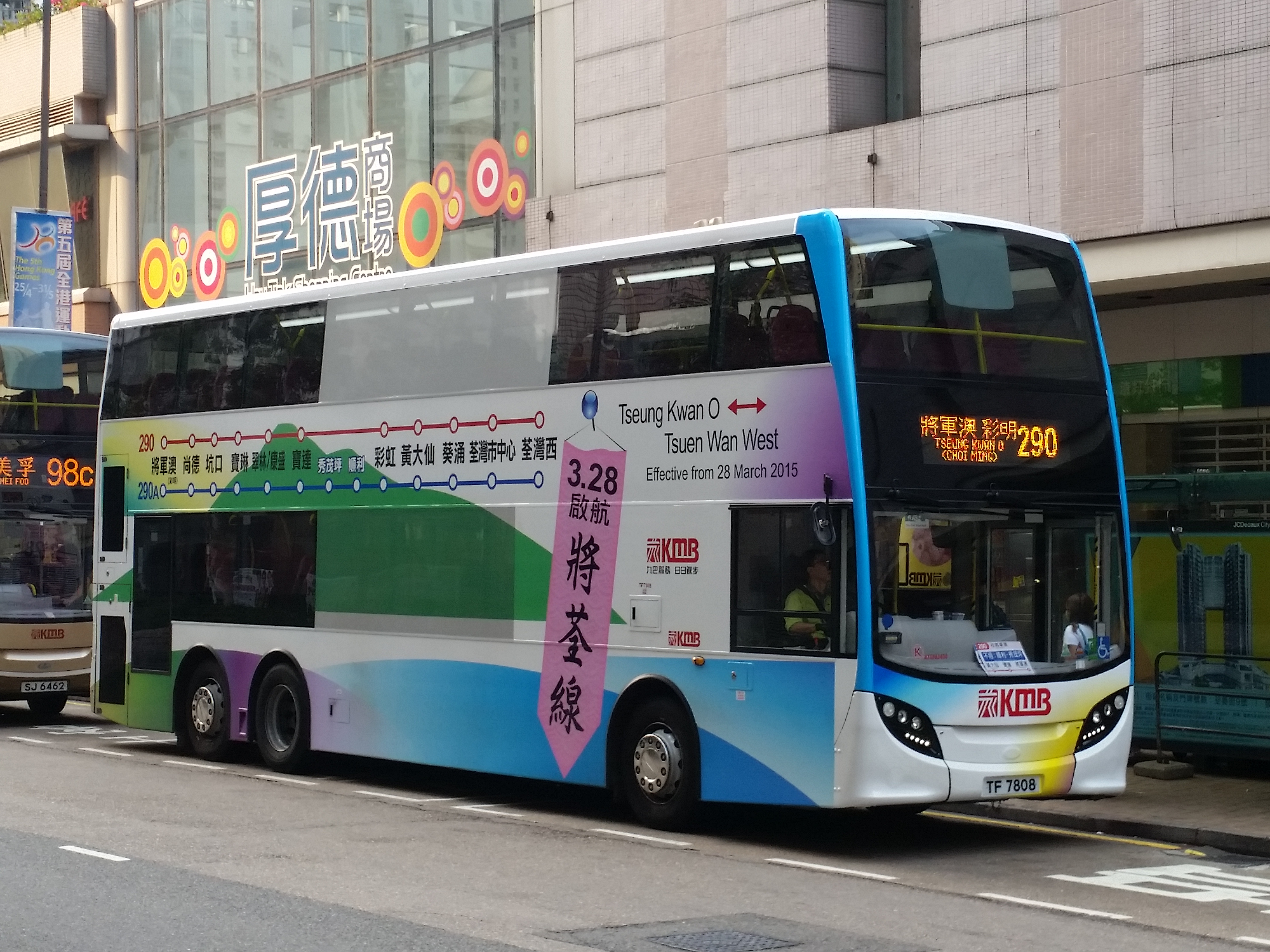 290 / 290A線其中一輛掛牌車（ATENU456 / TF7808）上掛「將荃線」全車身宣傳廣告，該車亦是「將荃線」290線於將軍澳（彩明）開出之首航班次派車，於2015年3月28日早上05:30於將軍澳（彩明）開出。